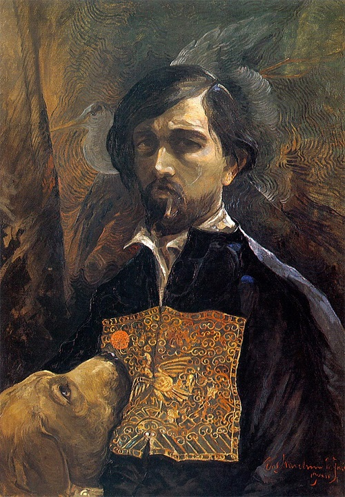 Autoritratto col cane, olio su tela, 90 x 63 cm., Pinacoteca di Forlì